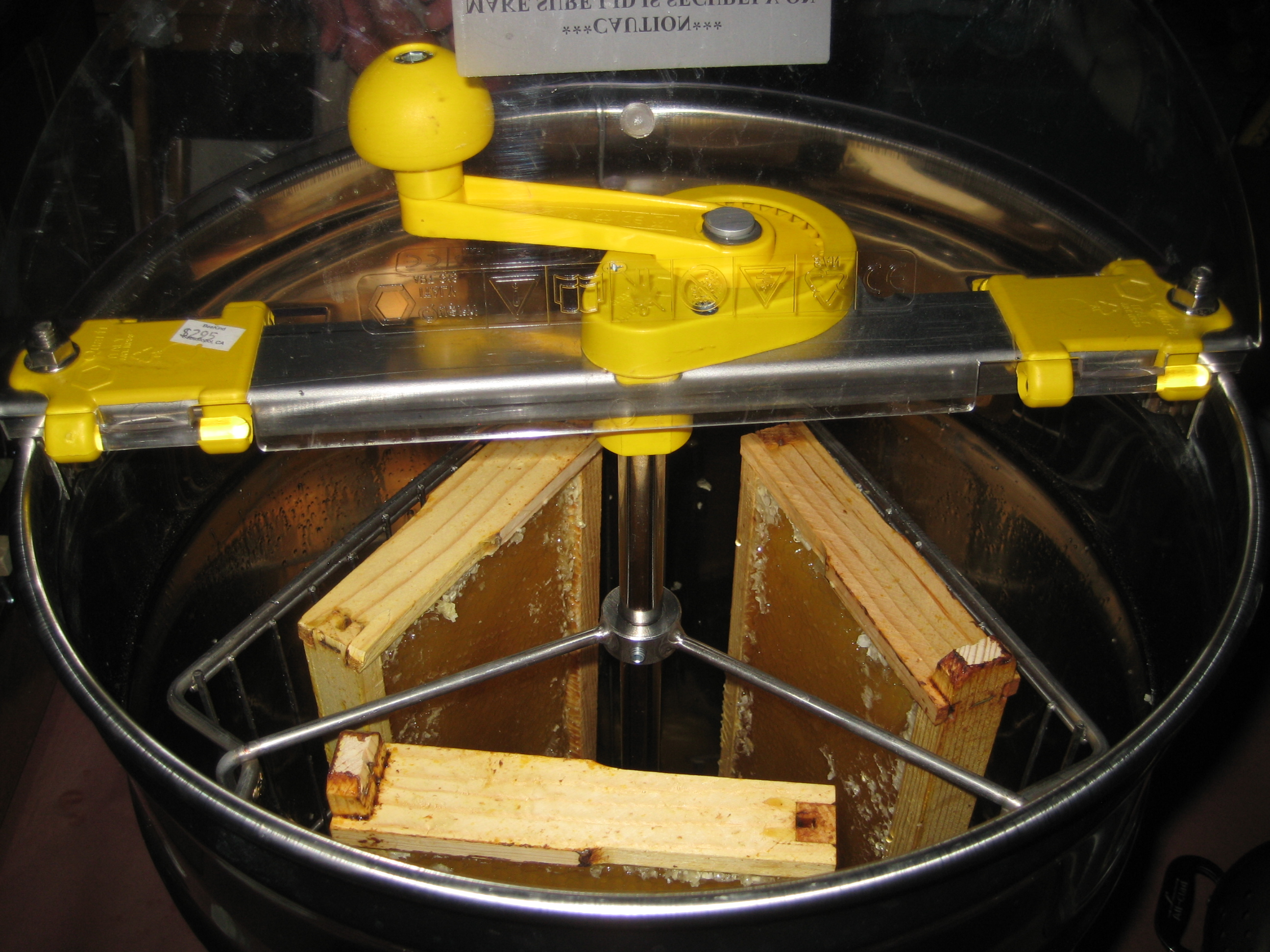 2010 2nd Harvest